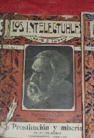 Los Intelectuales, revue argentine, n° consacré à des textes d'Octave Mirbeau (1848-1917)